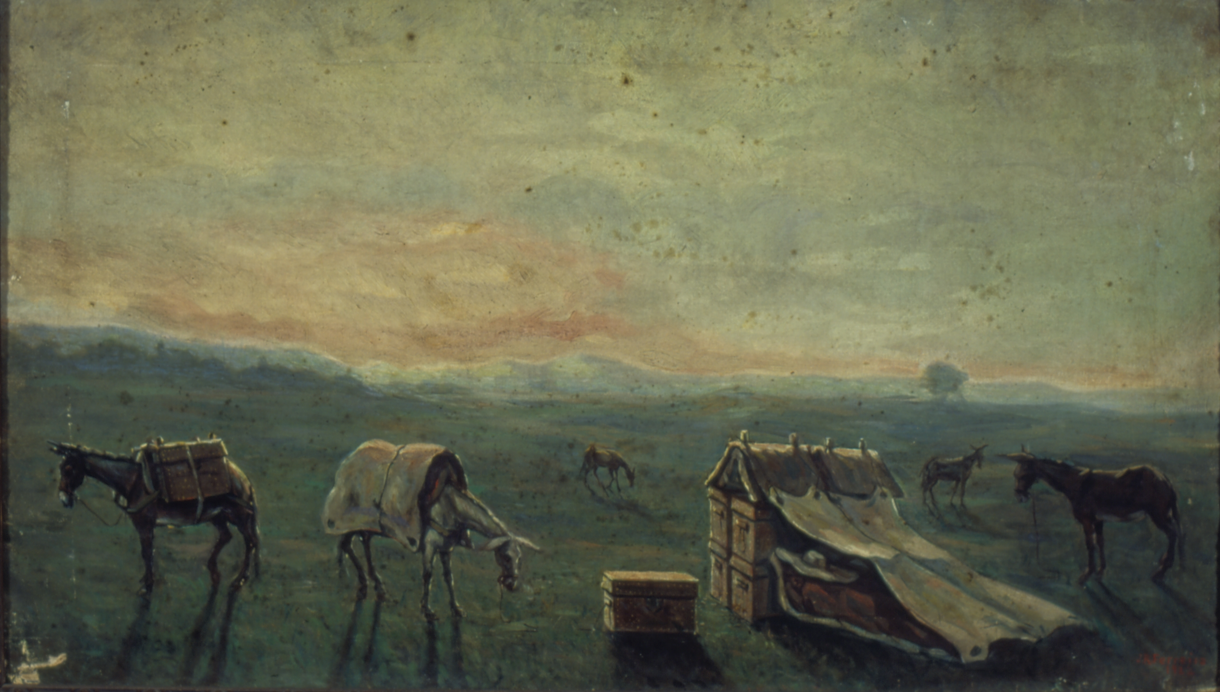 Obra que integra o acervo do Museu Paulista da USP. Coleção Fundo Museu Paulista.